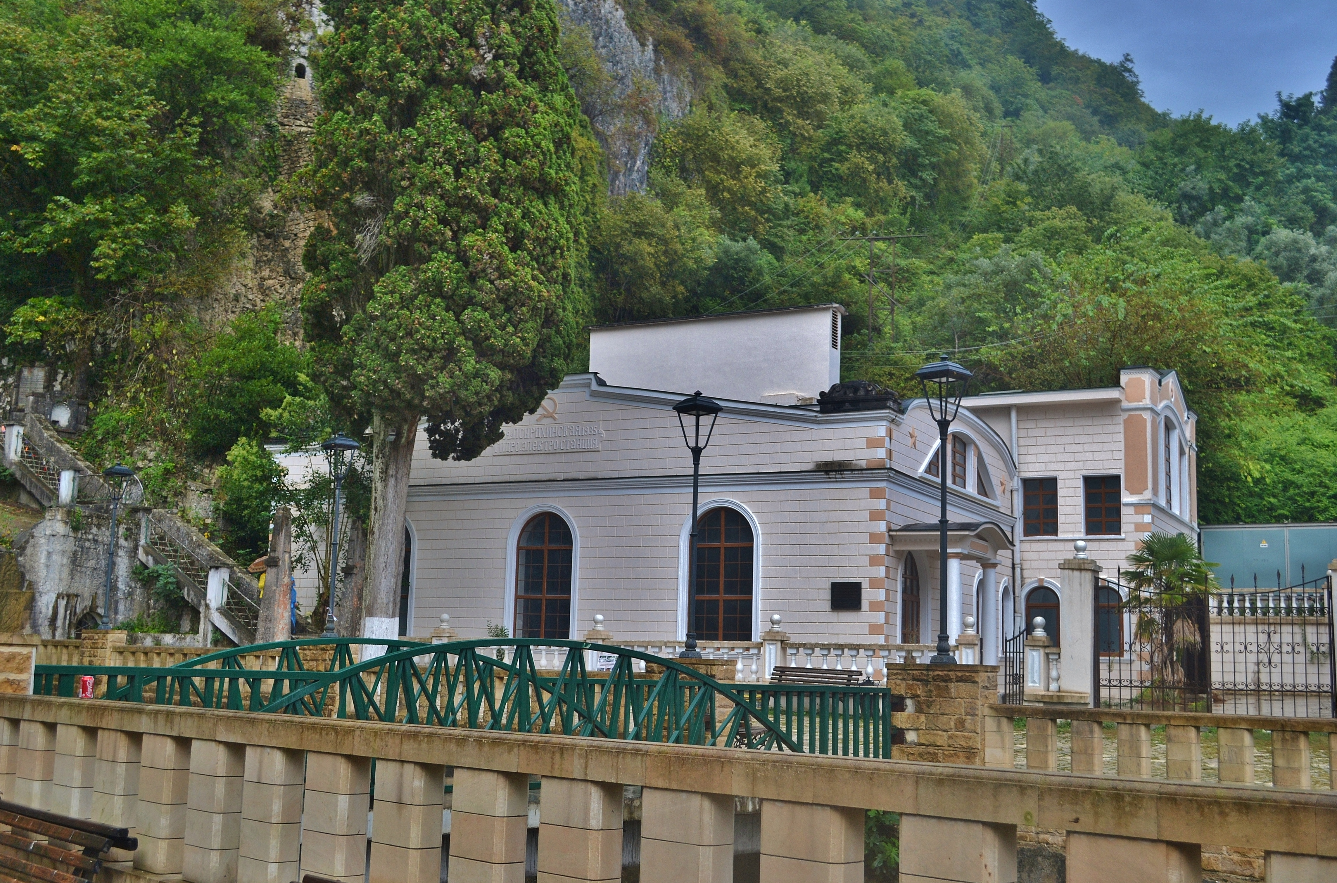 Псырцхинская гидроэлектростанция